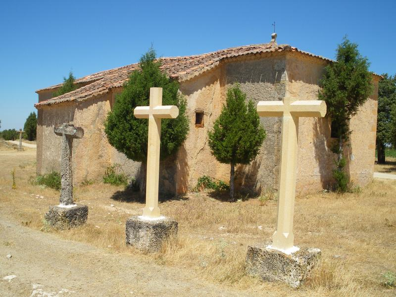 Ermita de la Virgen del Amparo, en Valleruela de Pedrza, Segovia, España.